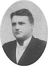 Molnár László magyar színész